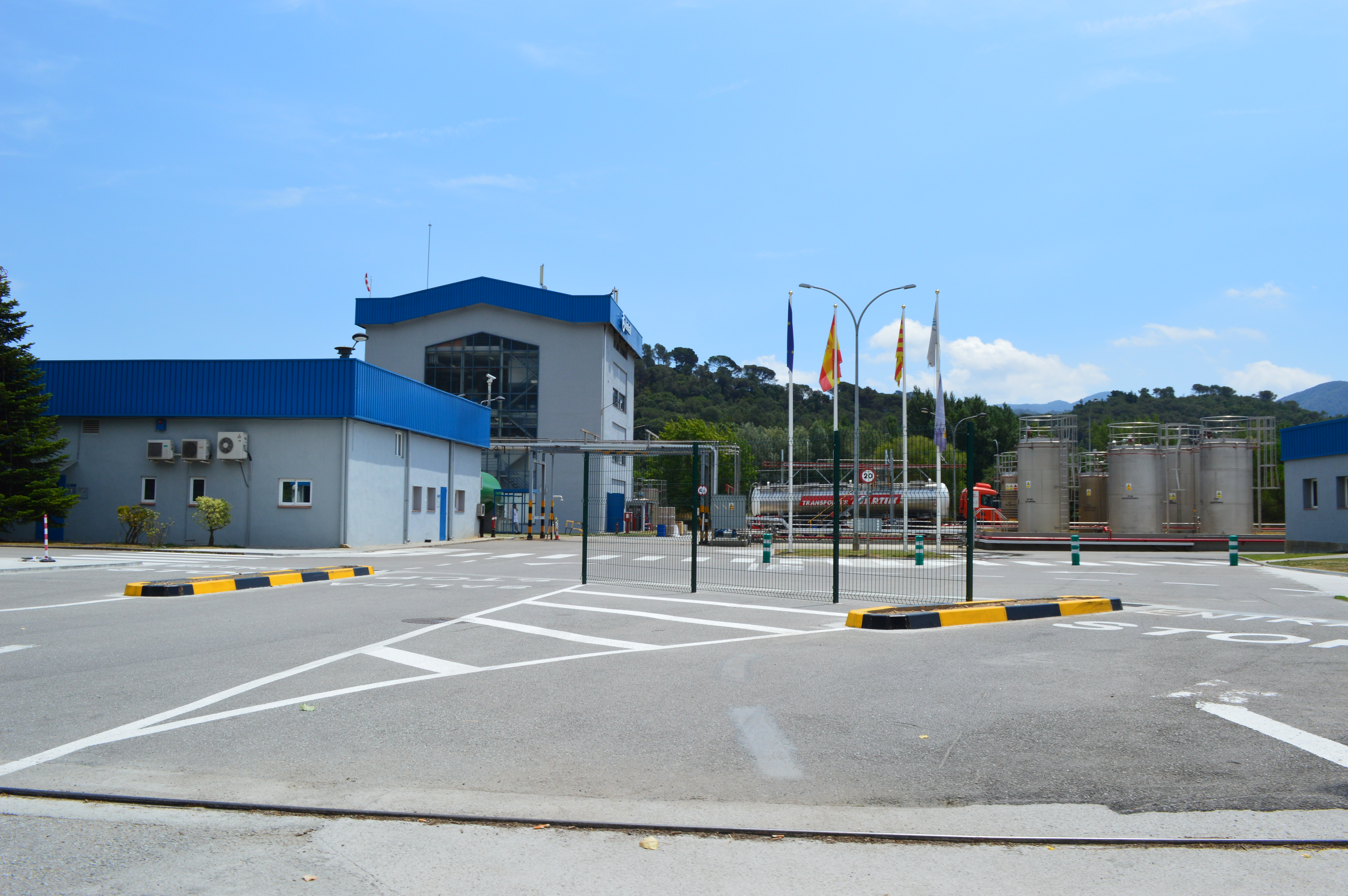 L’empresa farmacèutica Almirall, amb planta química a Sant Celoni (Ranke Química, SL).